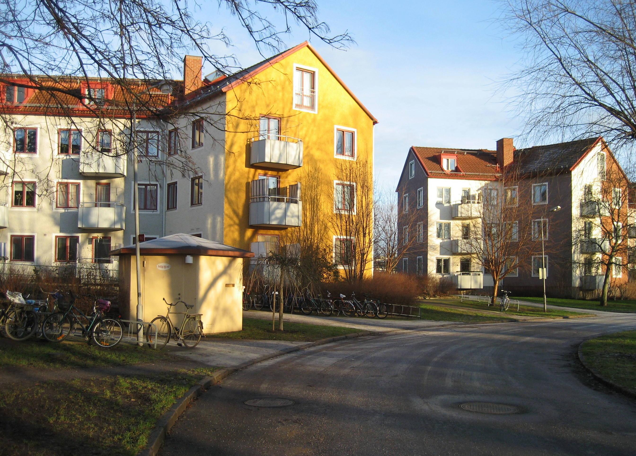 Stjärnhusen in Rosta, Örebro, Sweden